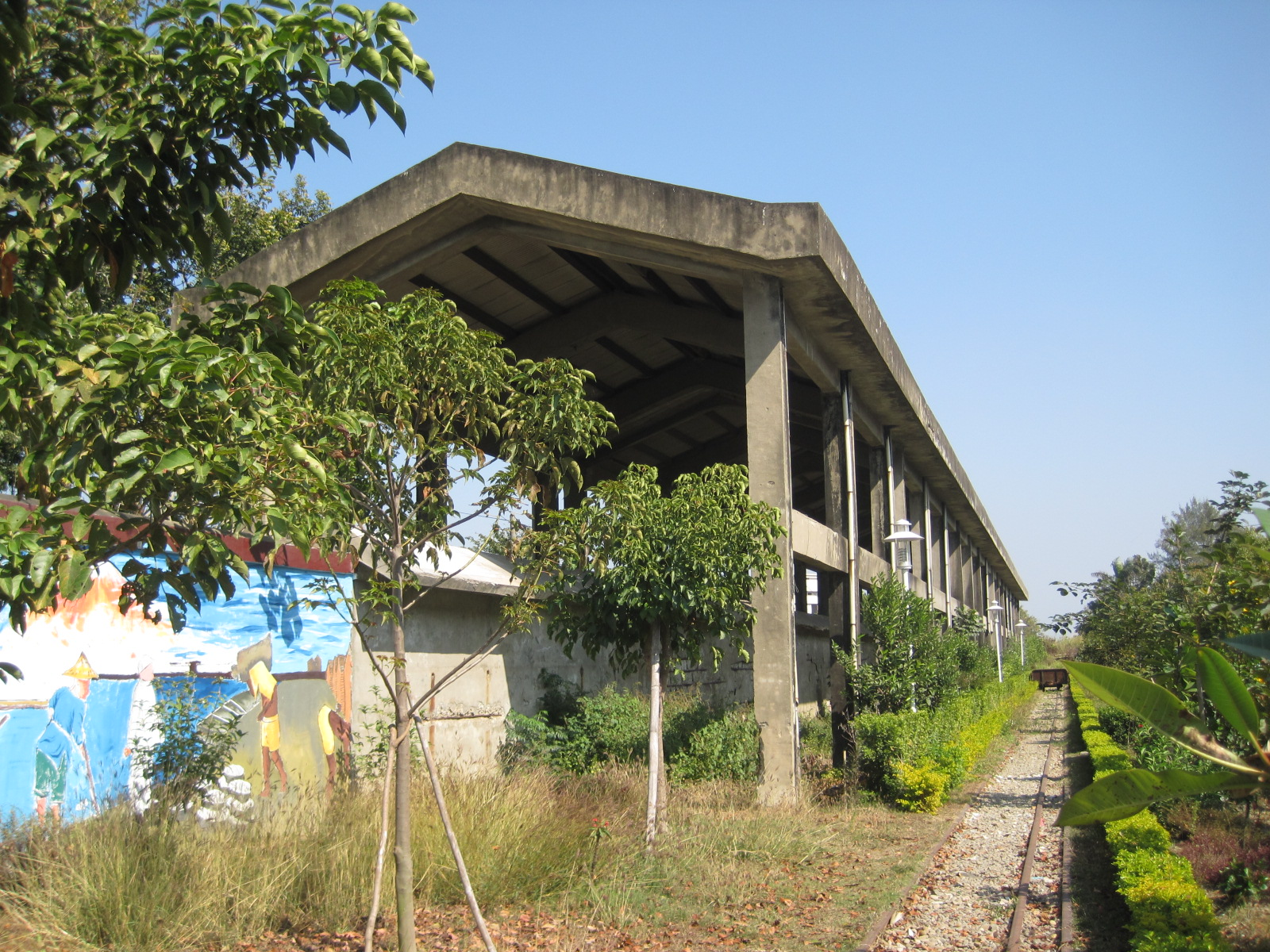 位於臺灣臺南市新營區的東太子宮鹽運聯合轉運臺